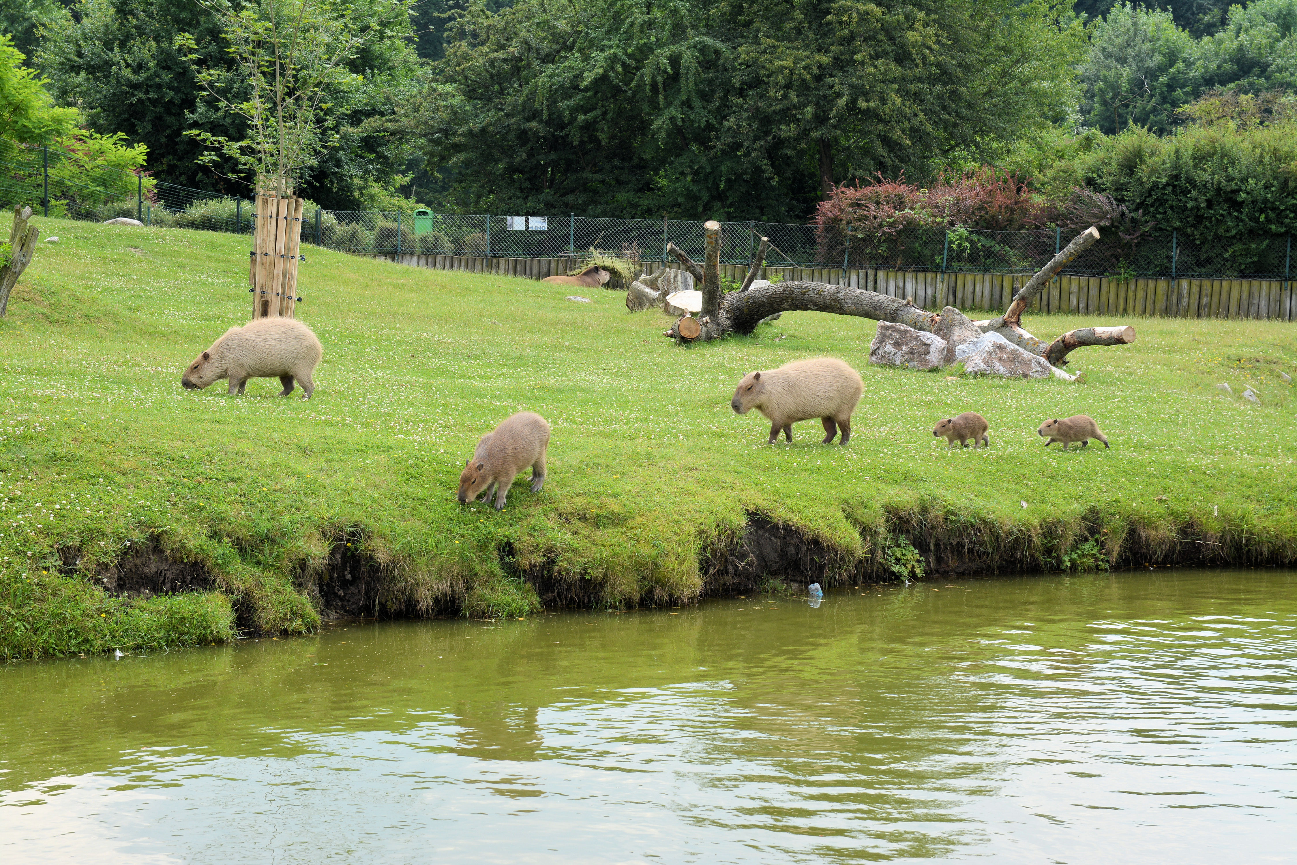 Kapibary w Nowym Zoo w Poznaniu